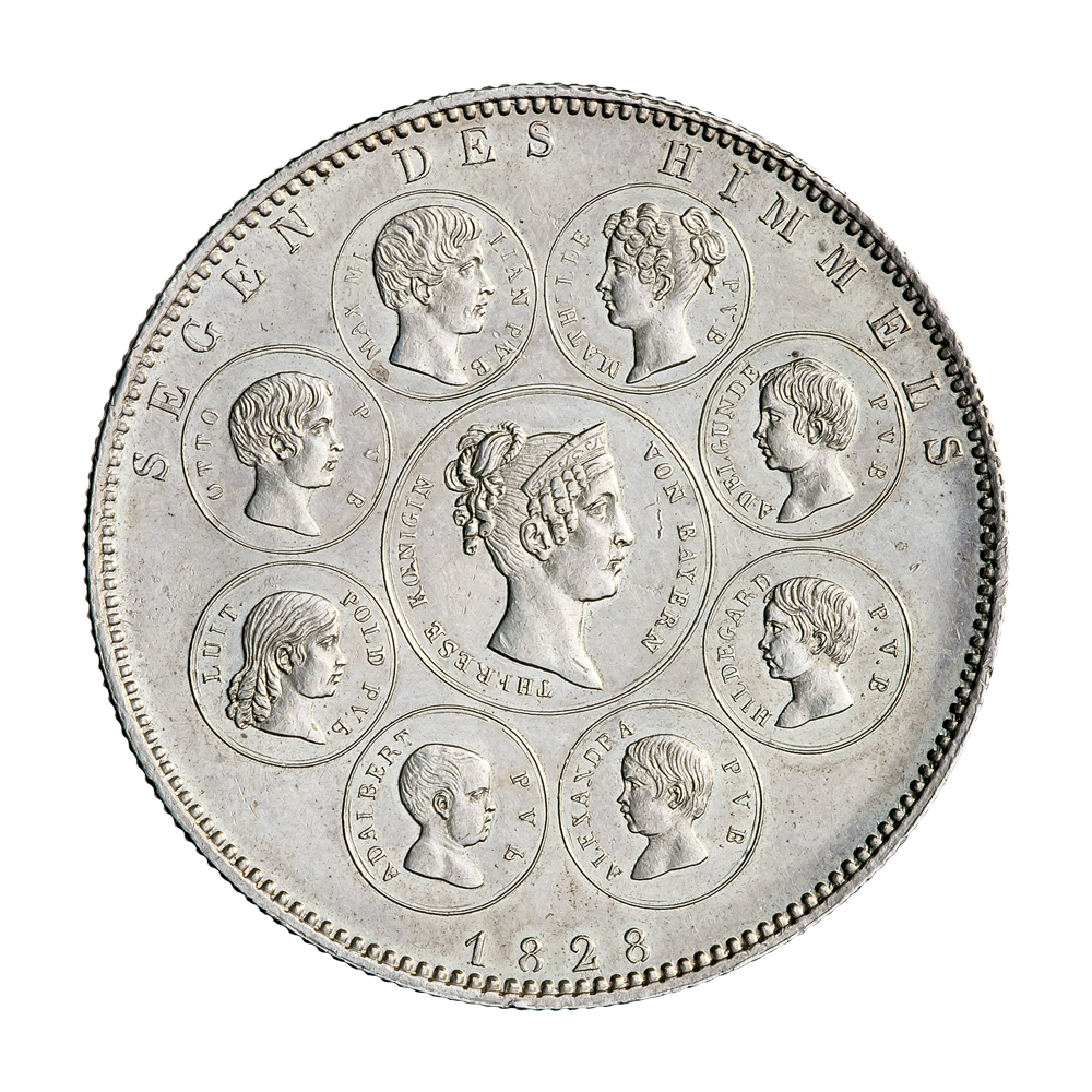 Бавария, королевство. Король Людвиг I (1825—1848). Талер 1828 г., т.н. «семейный». Памятная монета. Талер послужил прототипом и образцом для известного «Семейного полуторарублевика» императора Николая I в России в 1835 г. Серебро. Проба 833. Вес 28,02 г. Диаметр 38,0 мм. Гурт рубчатый.